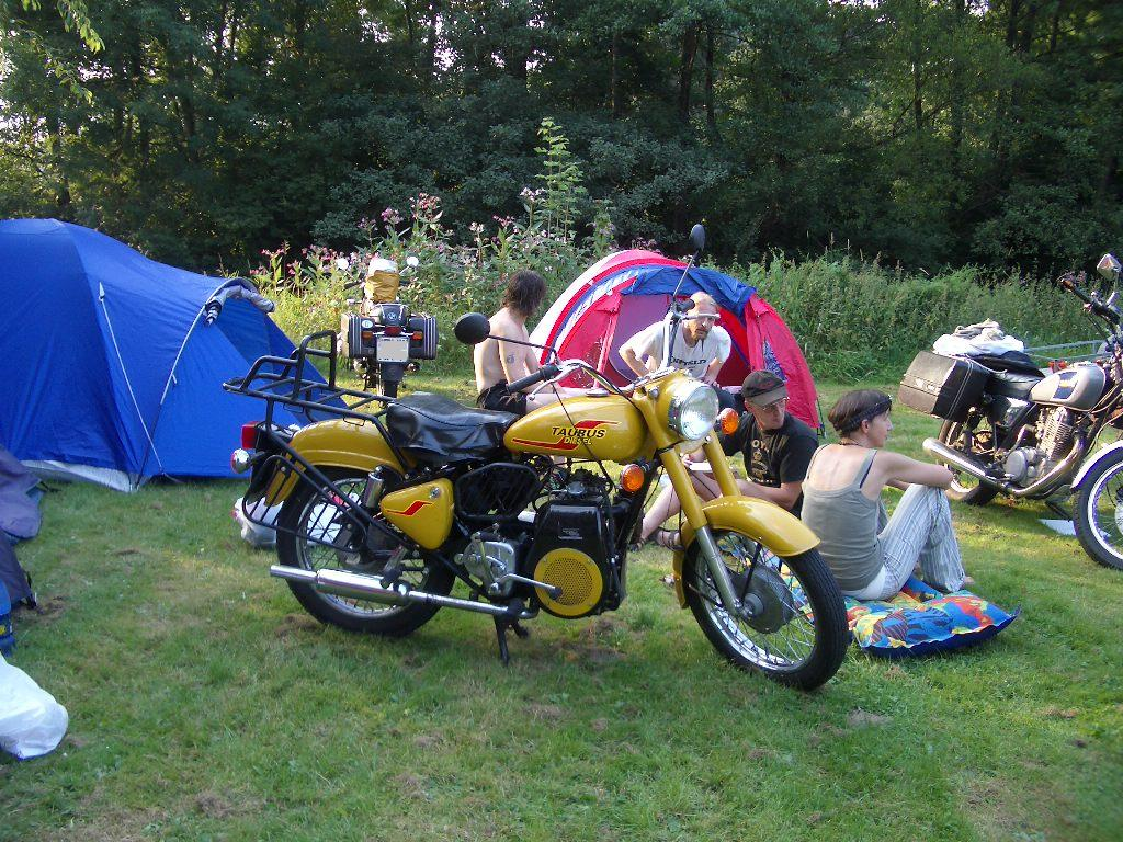 Das Dieselmodell Taurus 325 in der Cargoversion mit Änderungen der Firma Bullet Box.